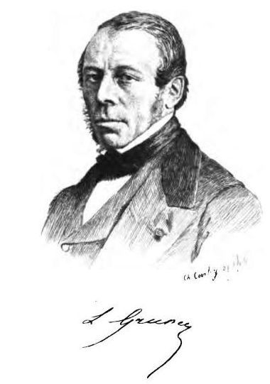 Портрет французького металурга і геолога Емануеля-Луї Грюнеля.